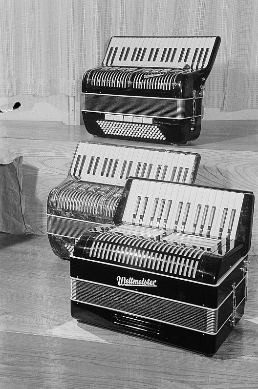 Original image description from the Deutsche Fotothek Drei Akkordeons des VEB Klingenthaler Harmonikawerke, Marke "Weltmeister", auf der Leipziger Messe 1954